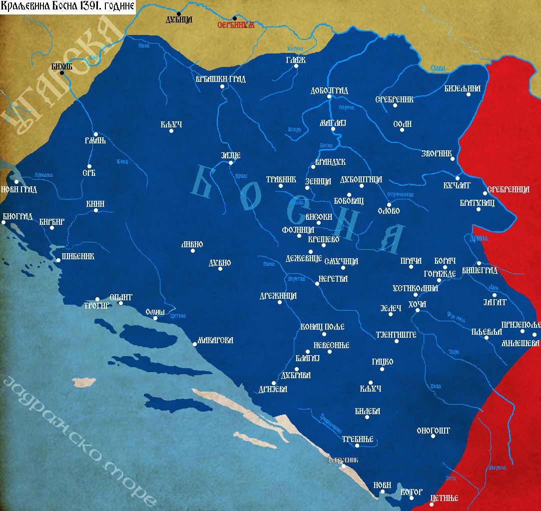 Королевство Босния в 1391 году